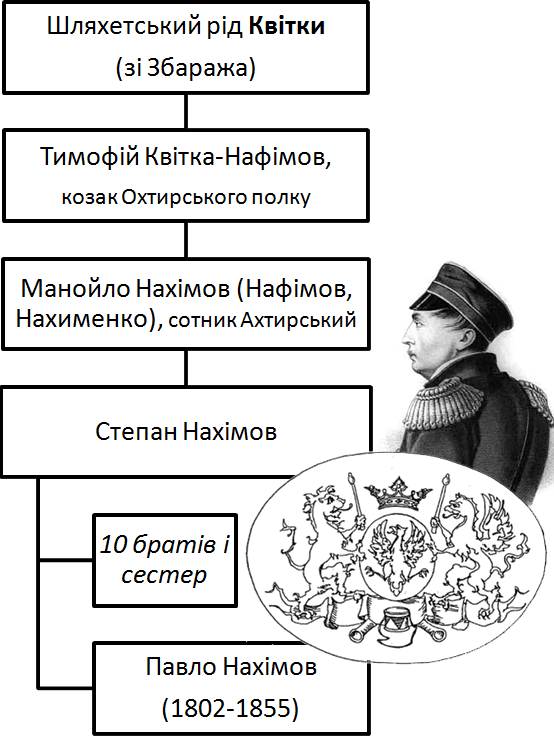 Родове дерево Павла Нахімова